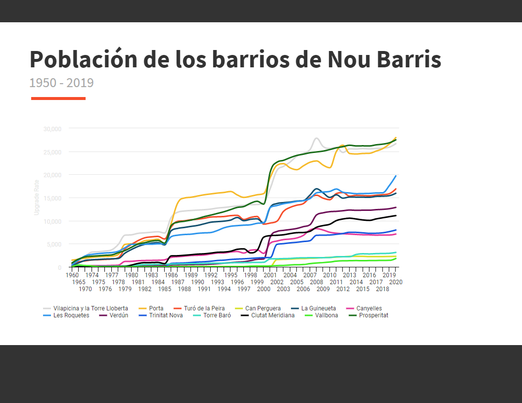 Poblacion de los barrios de Nou Barris